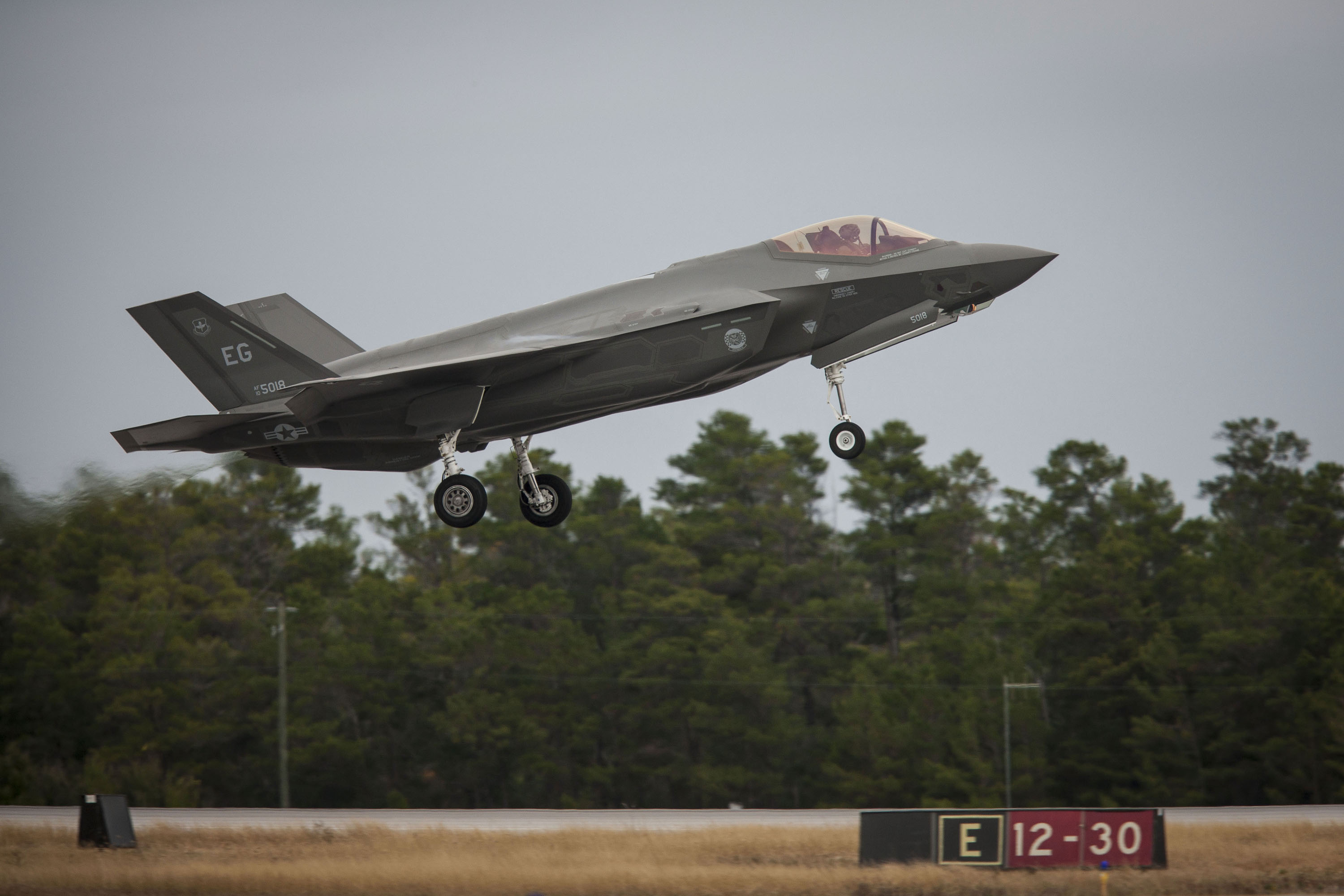 F-35 Lightning II stijgt op.